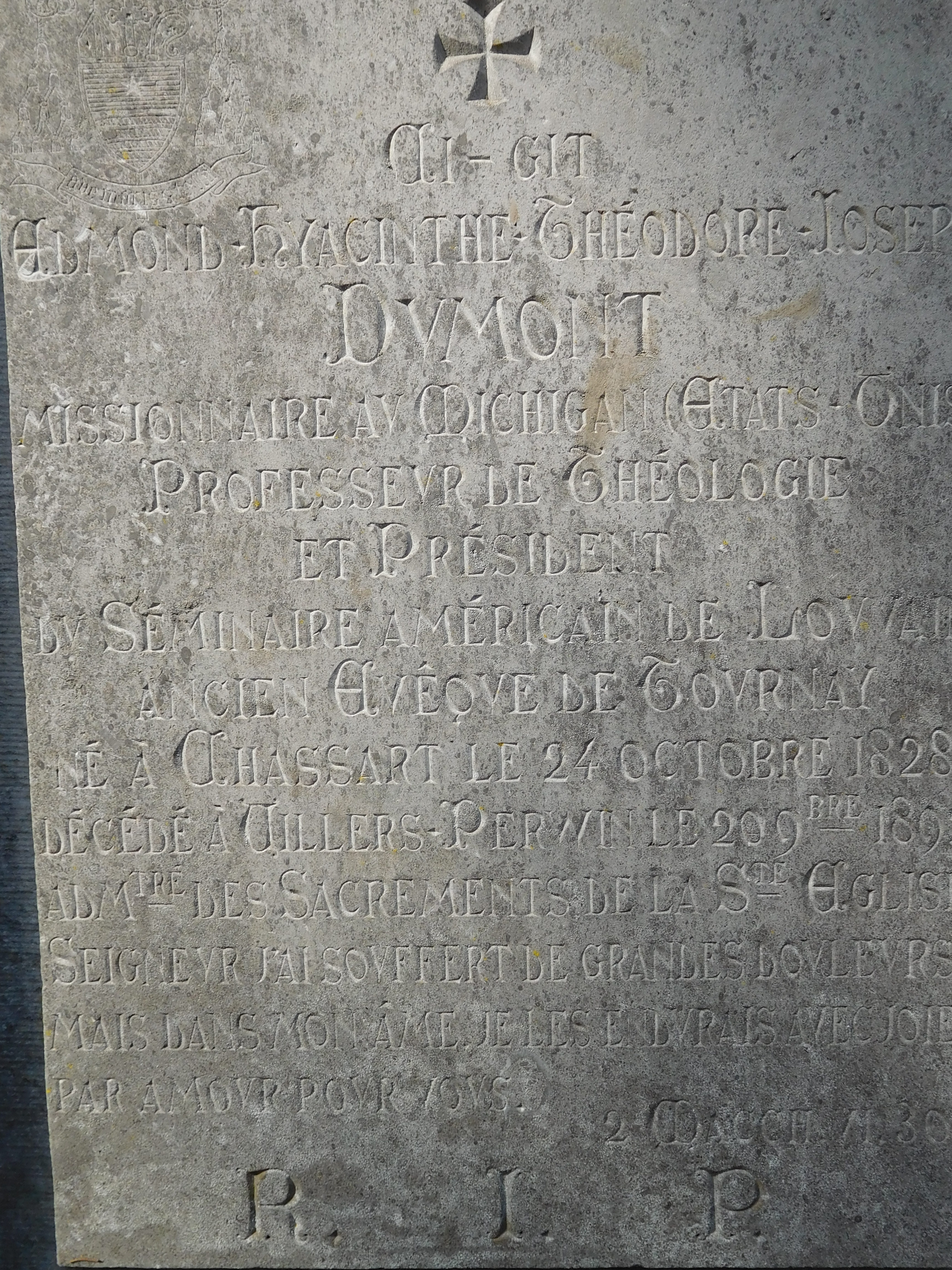 La pierre tombale d'Edmond-Joseph Dumont (1828-1892), 97ème évêque de Tournai, dans le caveau de famille, à Villers-Perwin (Belgique)